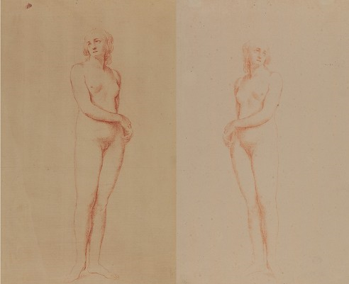 Stehender weiblicher Akt, Rötel, daneben rechts fotografisch montiert der Abklatsch